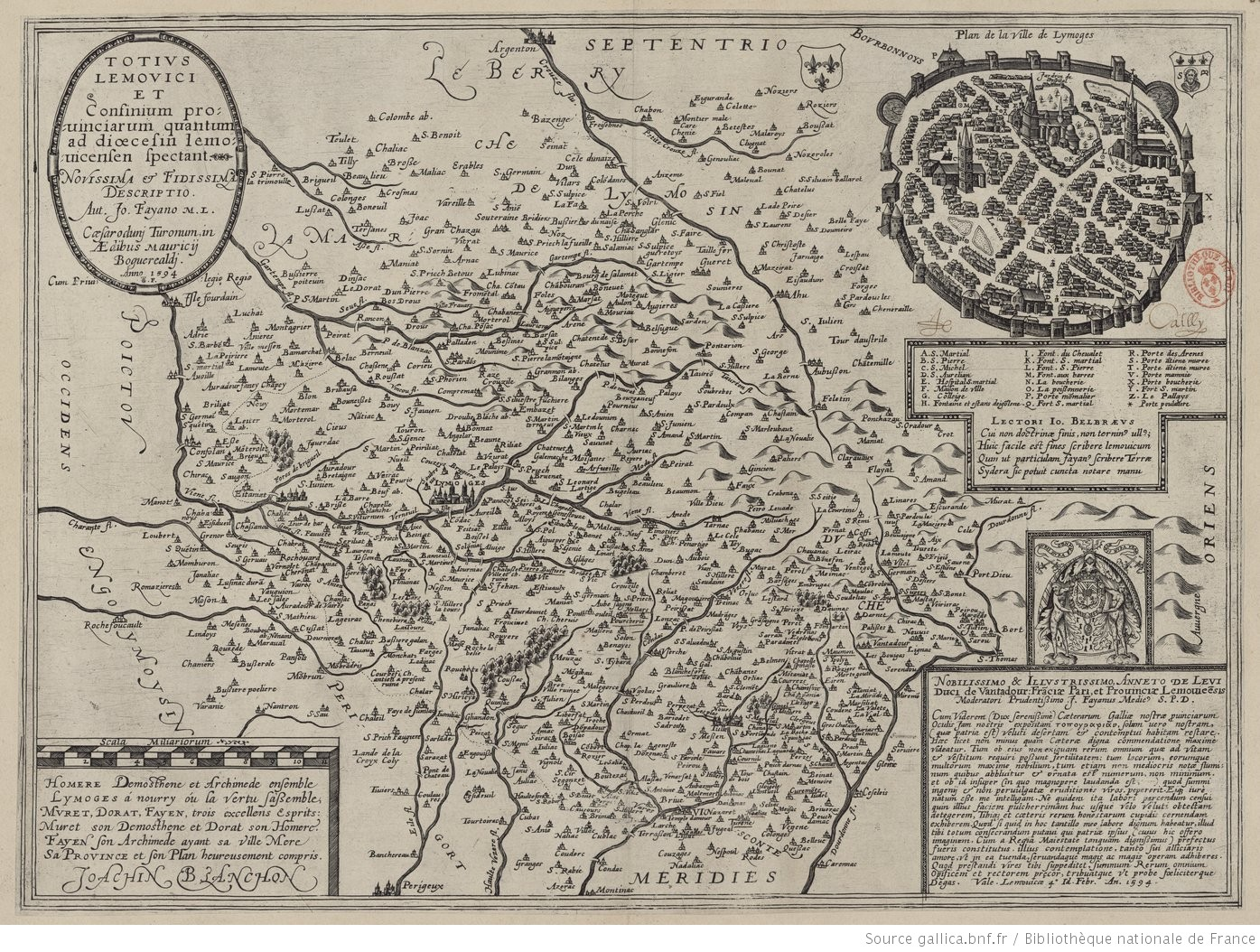 Totius Lemovici et confinium provinciarum quantum ad dioecesin lemovicensen spectant: Karte des Limousin, Kupferstich nach einer Zeichnung von Jean Fayen und von Maurice Bouguereau in seinem Atlas Le Theatre Francoys 1594 in Tours veröffentlicht.